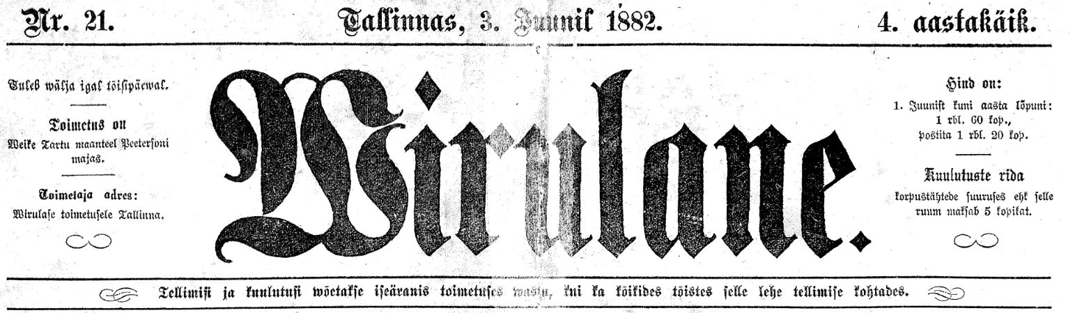 Wirulane 1882 päis